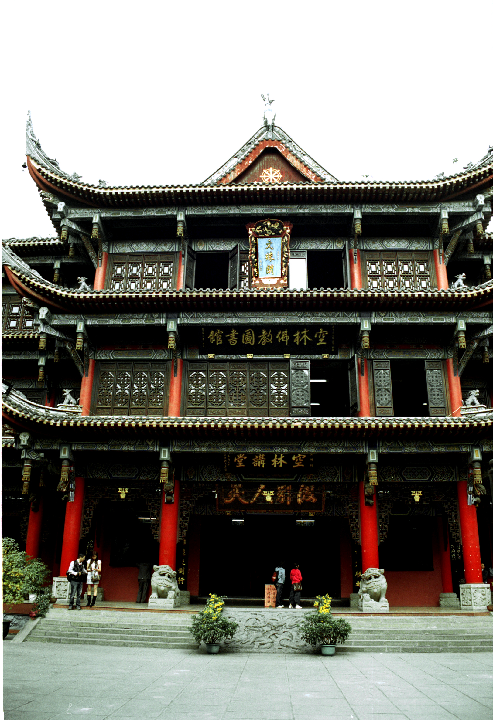 文殊阁